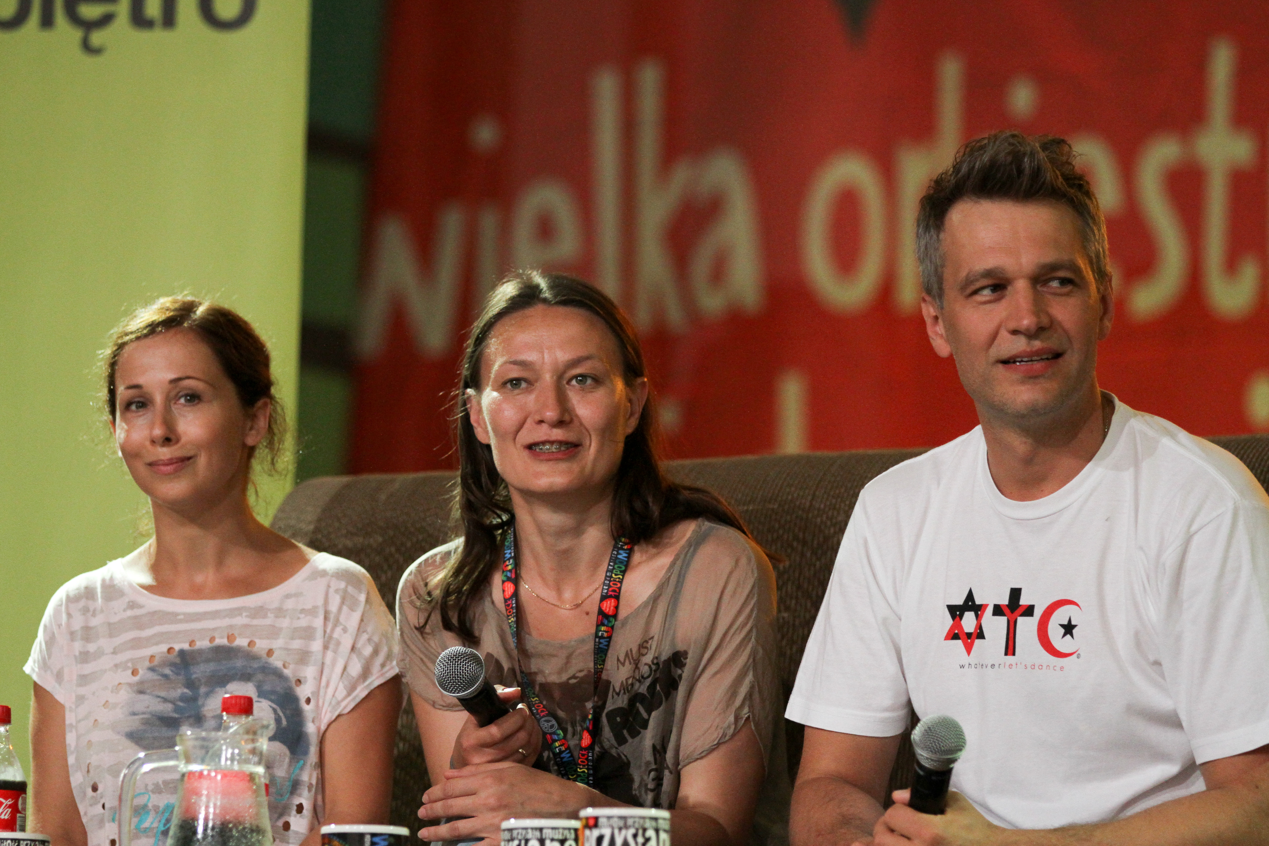 Schauspielerin Jolanta Fraszyńska, Regisseurin Małgorzata Bogajewska und der Schauspieler Michał Żebrowski (v.l.n.r.) des Teatr 6. Piętro auf der 20. Haltestelle Woodstock 2014.